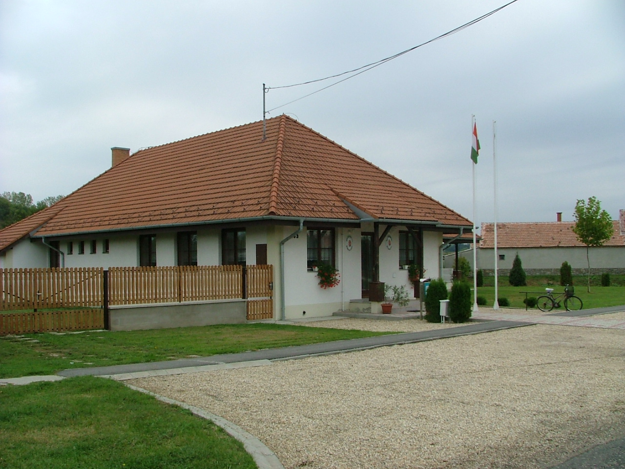 Röjtökmuzsaji községháza